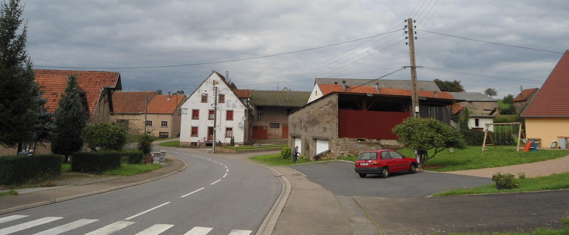 Nousseviller-lès-Bitche Ortsmitte/Centre